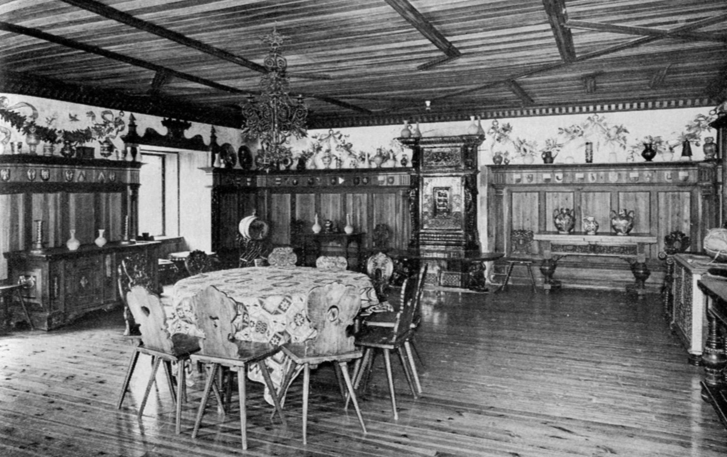 Tullgarns slott, Frukostrummet inredd 1887-1893